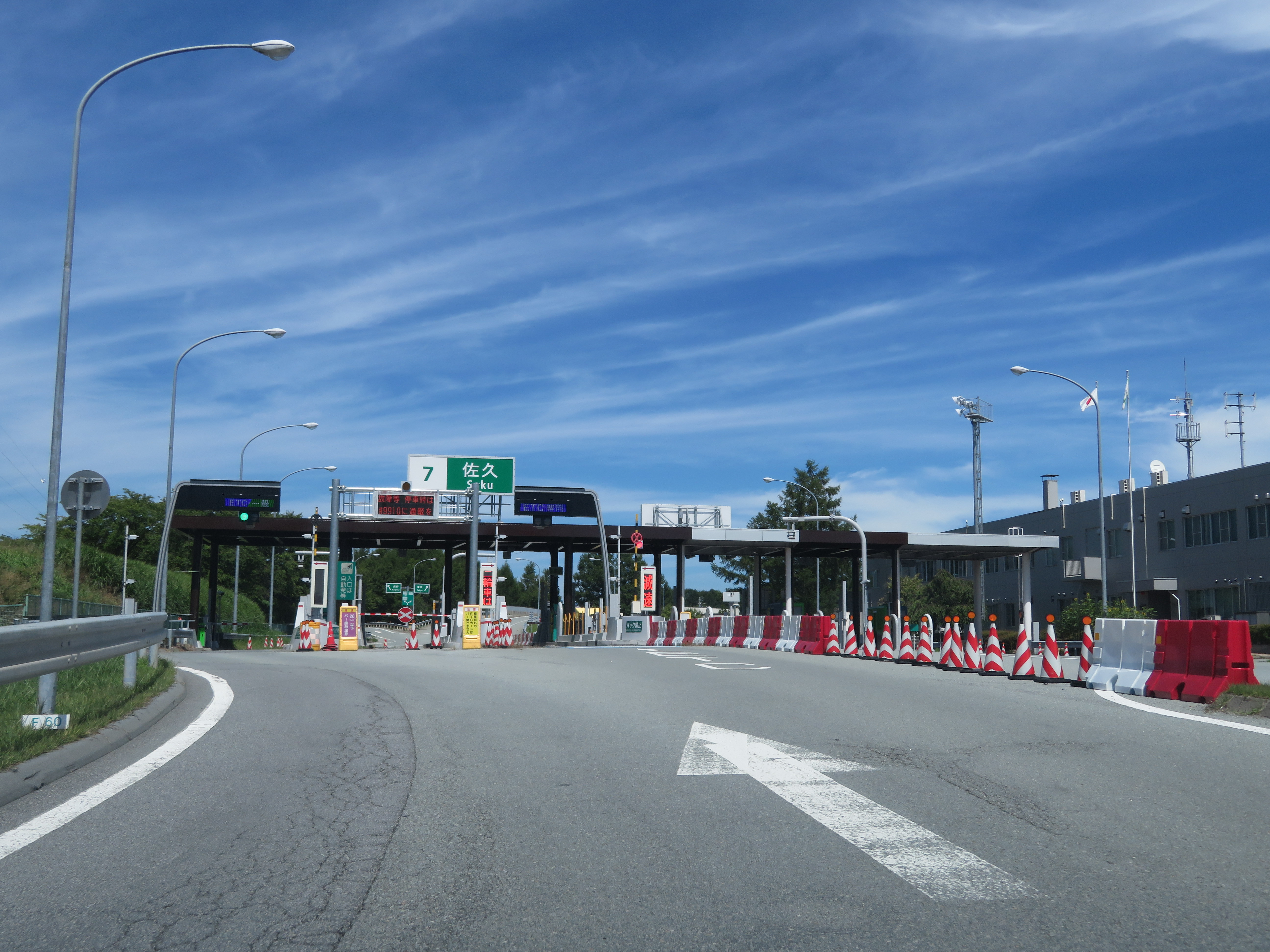 上信越自動車道佐久インターチェンジ料金所付近 Canon PowerShot SX720 HS